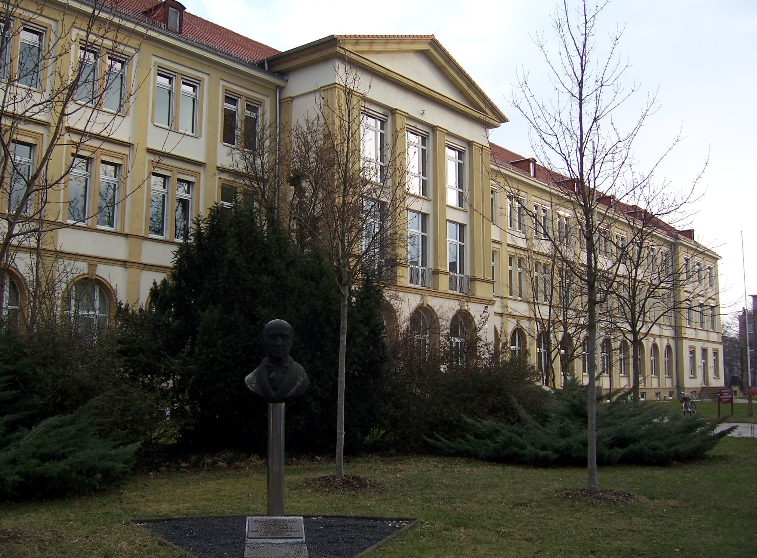 Hauptgebäude (Haus 40, Fiedlerstraße 27) der Medizinische Fakultät Carl Gustav Carus der TU Dresden auf dem Gelände des Universitätsklinikums Carl Gustav Carus mit dessen Büste